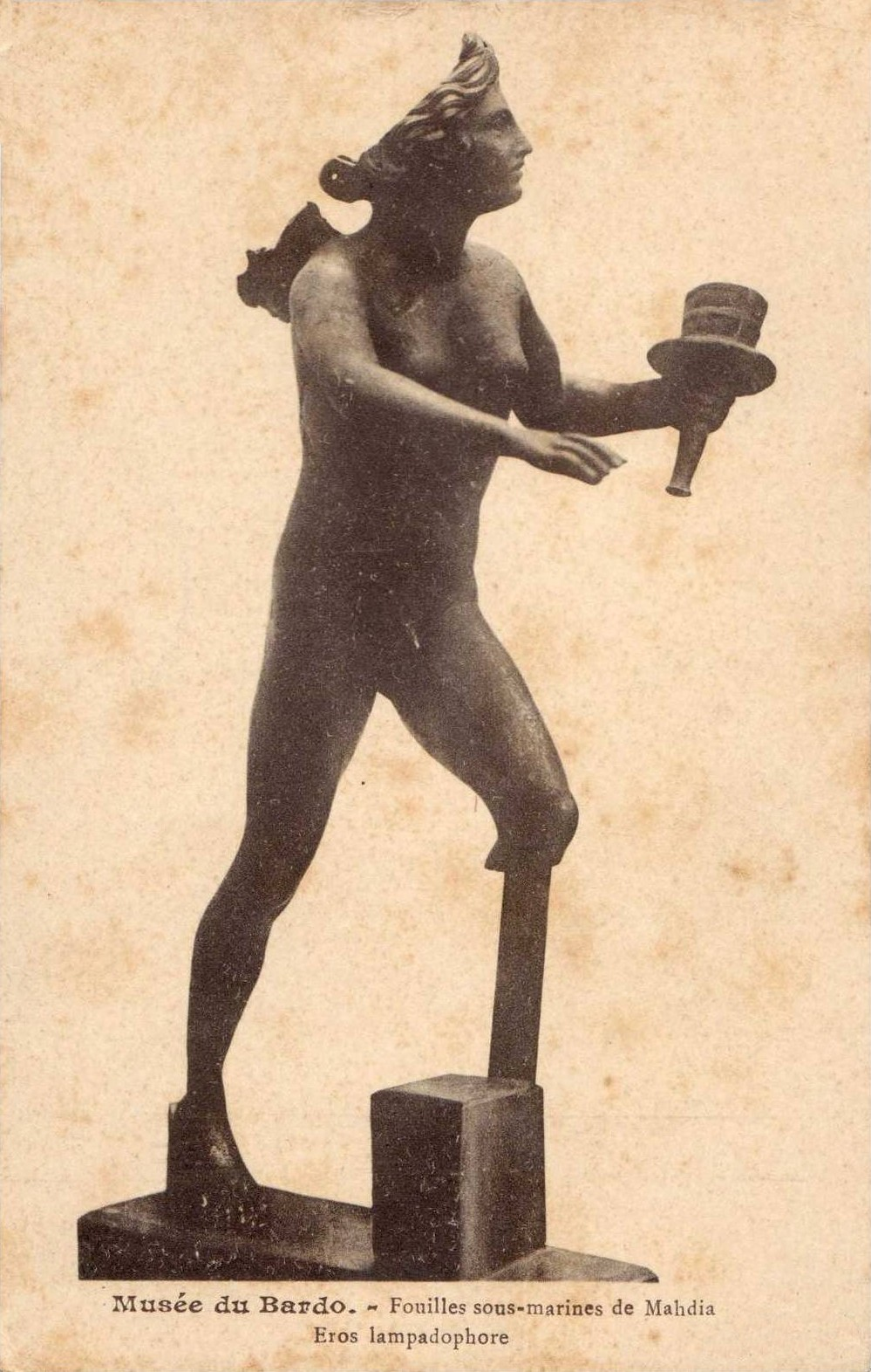 Eros androgyne. Fouilles sous-marines de Mahdia. Autour de 100 av. J.-C. Bronze. Lampe en forme d’Eros ailé, portant un flambeau.[1]